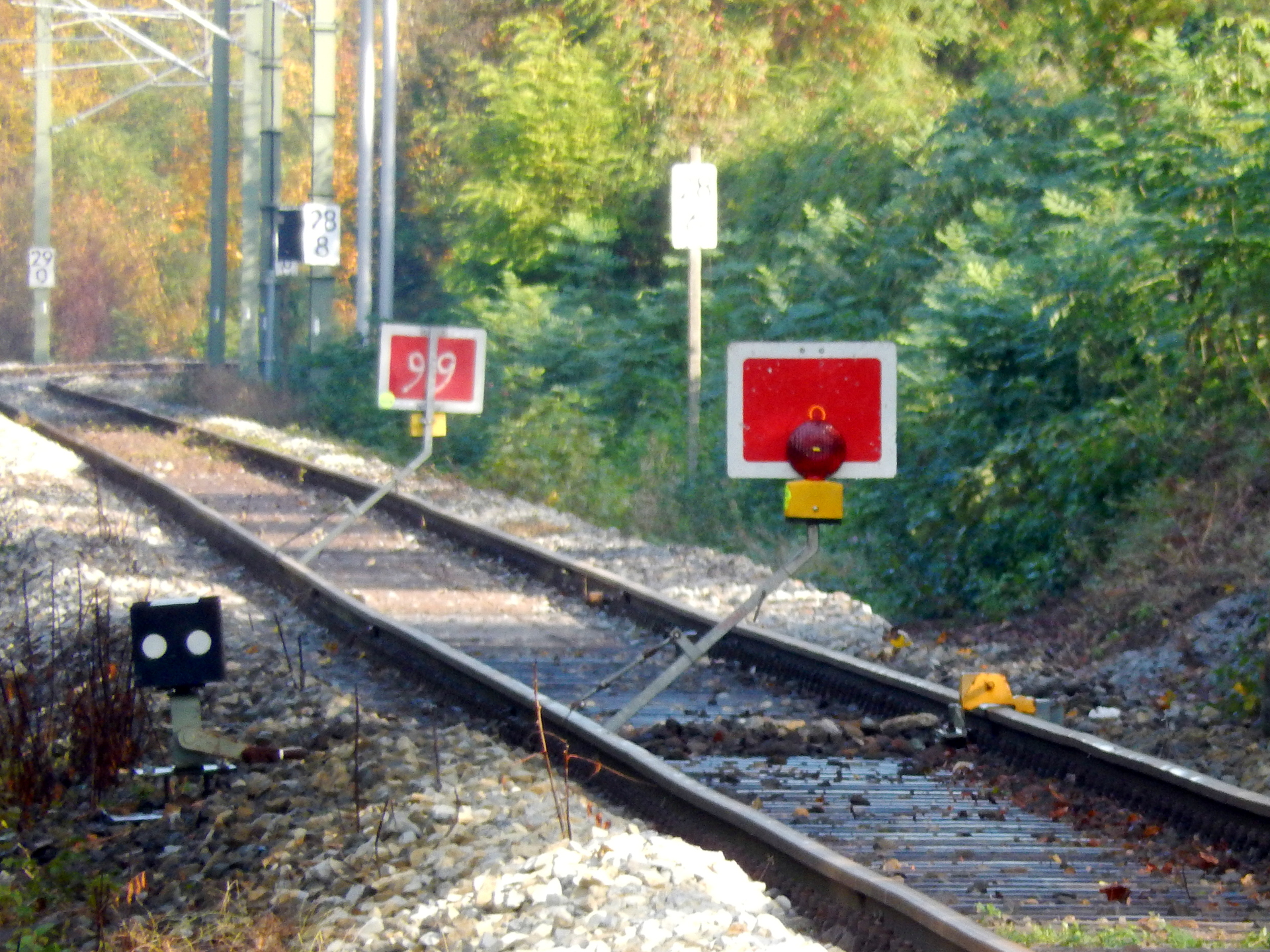 Anfang des Baugleises in Höhe des Einfahrsignals F des Bahnhofs Bad Rappenau beim Umbau für die AVG-Stadtbahn.